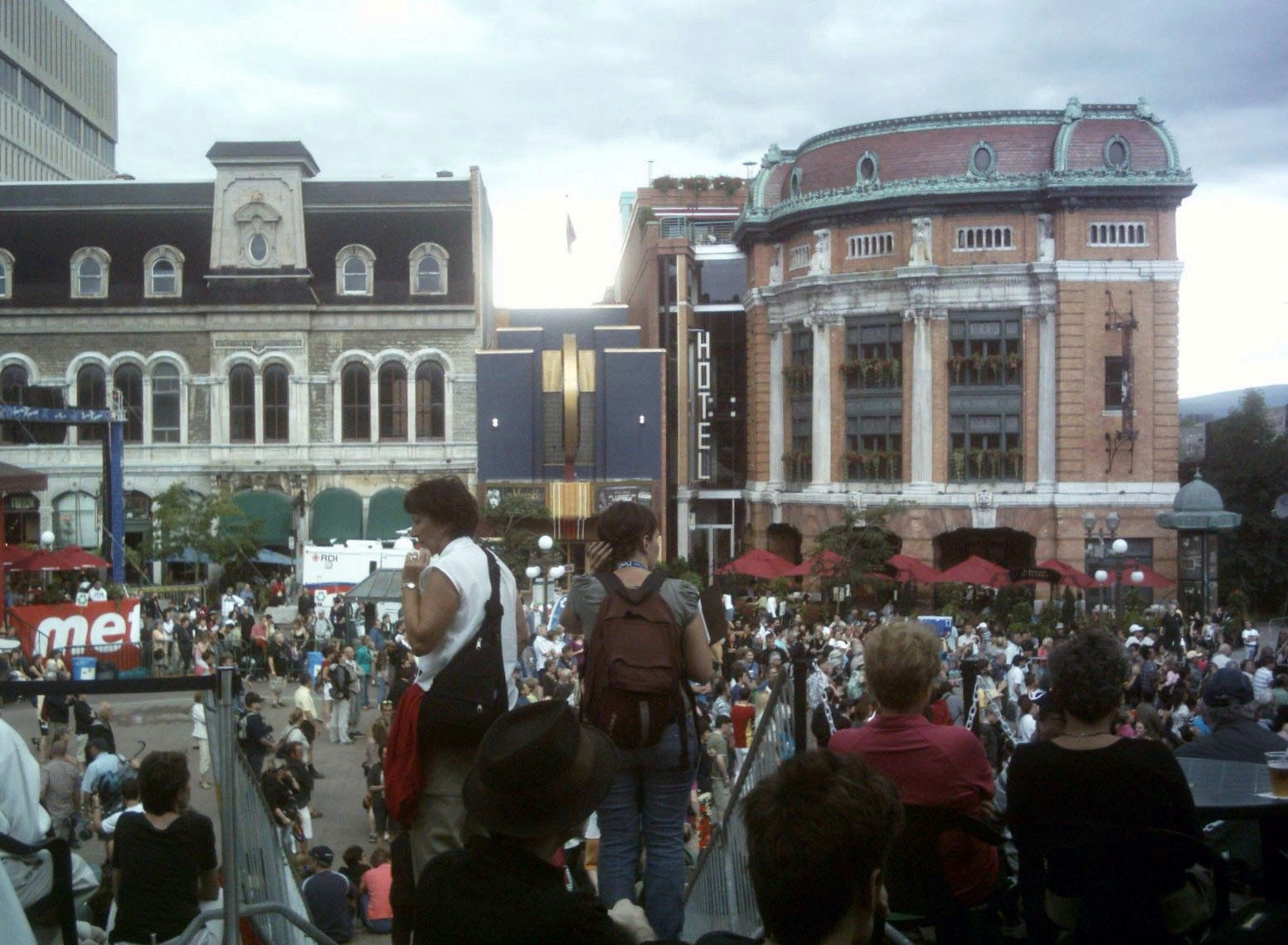 Le festival d'été de Québec, place d'Youville